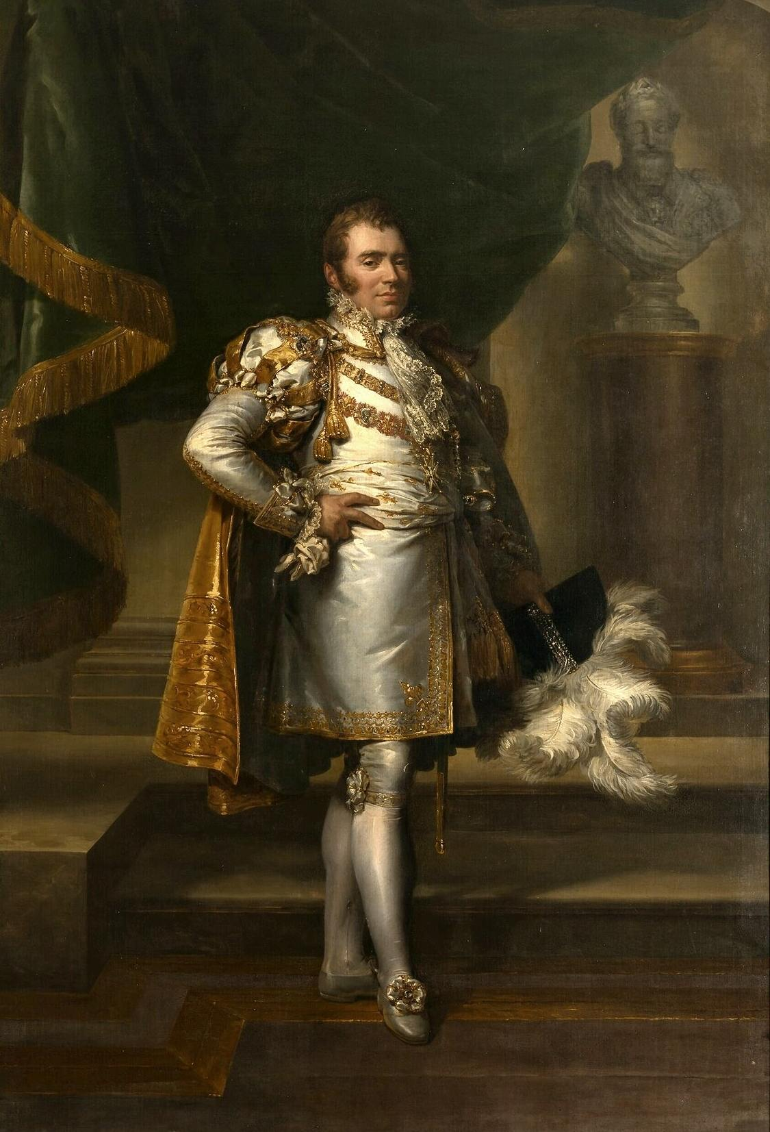 Charles-Ferdinand d'Artois, duc de Berry